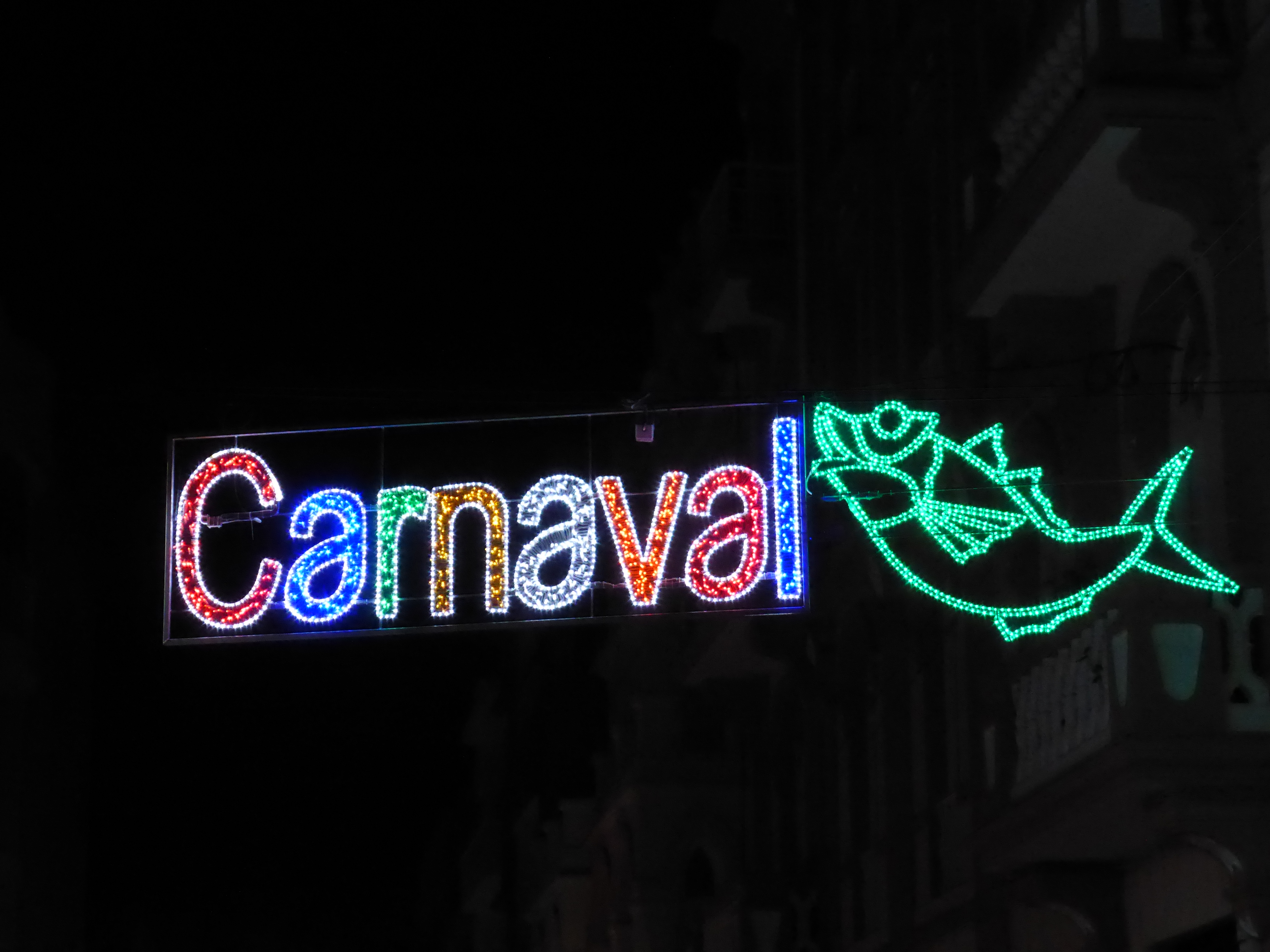 El carnaval chicharrero (de Santa Cruz de Tenerife), en este anuncio o rótulo luminoso, tiene un pescado como símbolo. Se trata de un "chicharro" (chicharro o jurel:Trachurus trachurus). El chicarro formaba parte de la comida habitual de los pescadores de Santa Cruz de Tenerife. Y "chicharrero" es el gentilicio informal de los habitantes de esta ciudad. Este anuncio luminoso del año 2016 se encuentra en la calle del Castillo, de Santa Cruz.